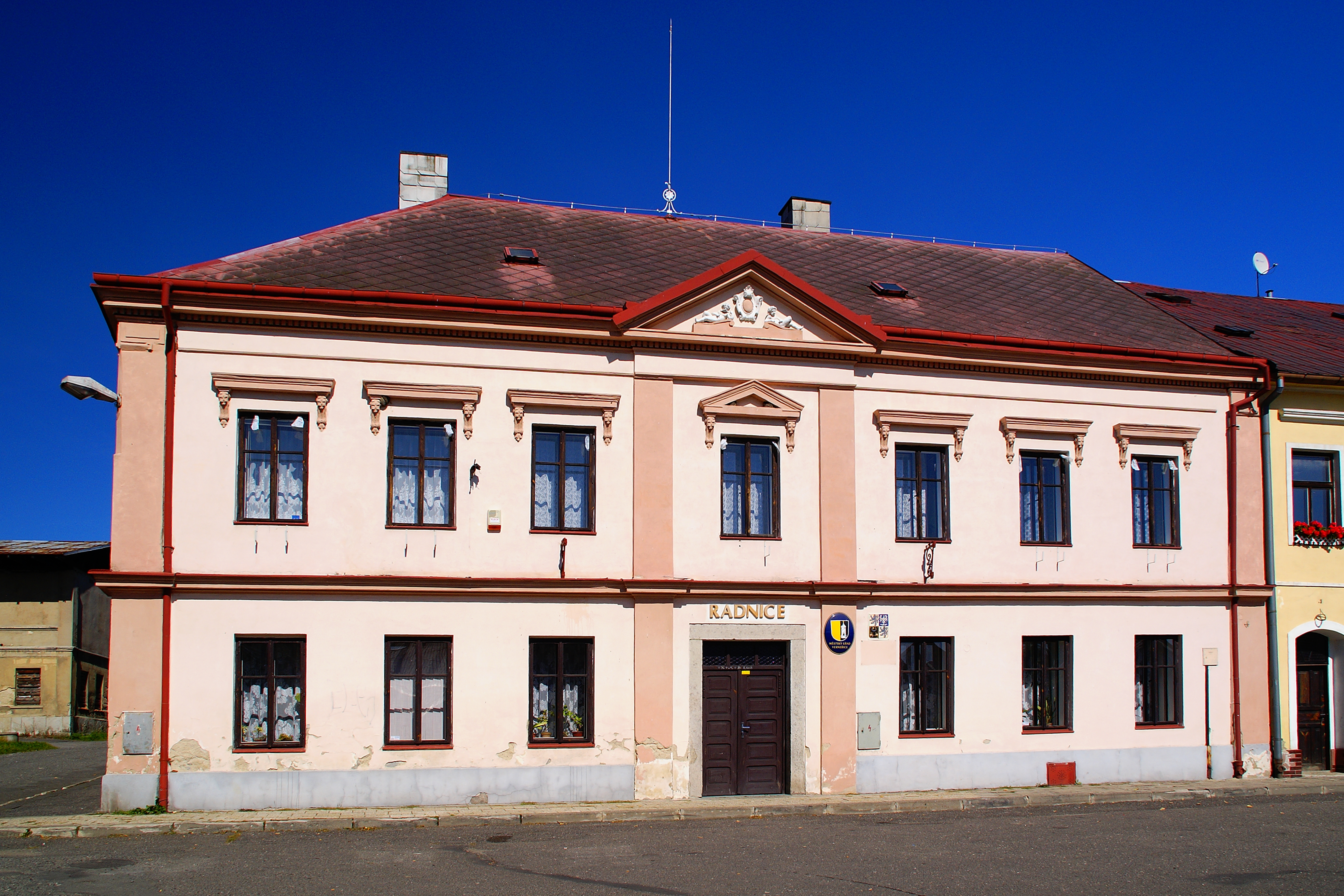 Budova městského úřadu na Mírovém náměstí ve Verneřicích u Děčína.